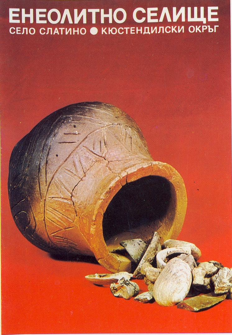 Енеолитно селище (с. Слатино)